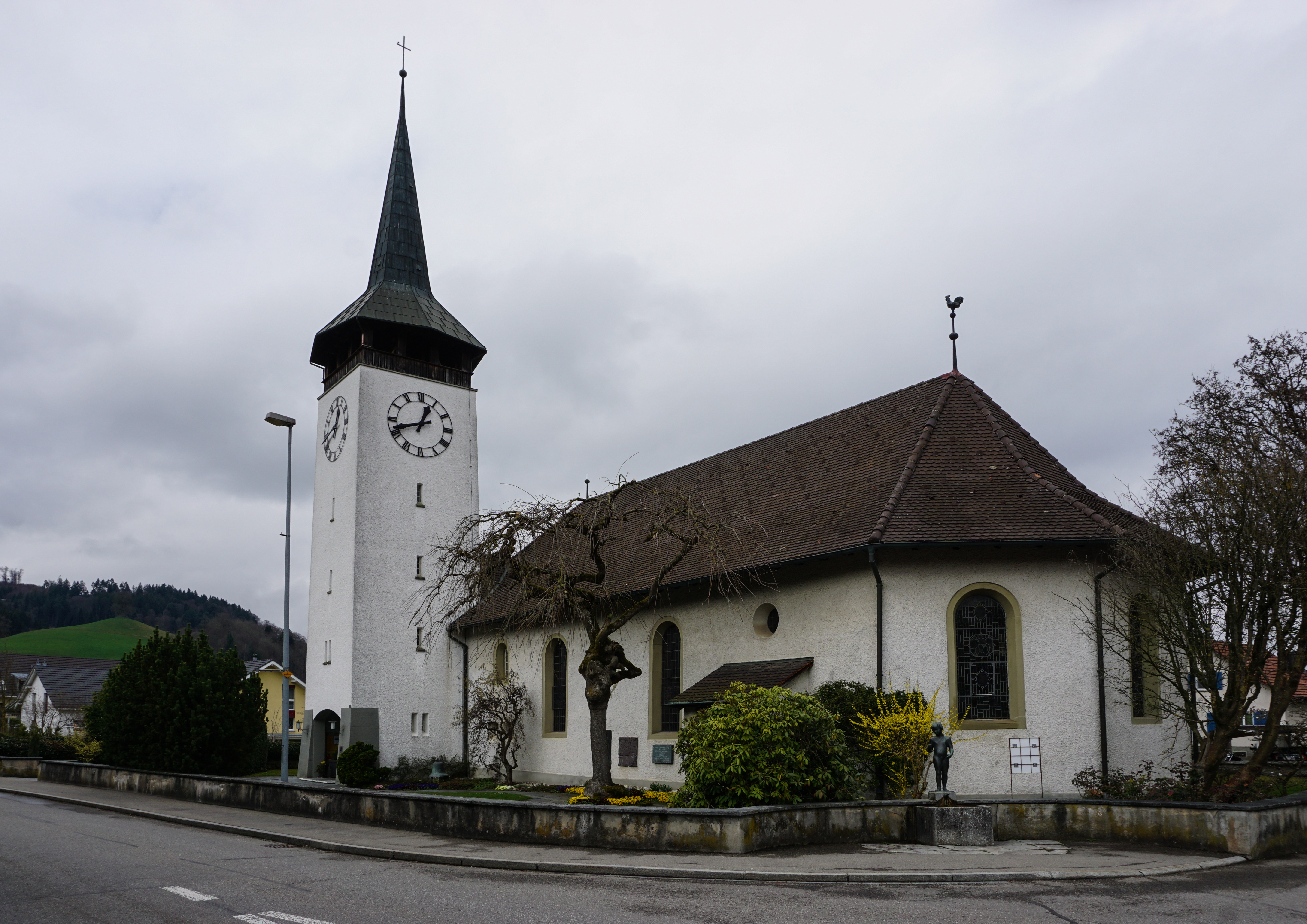 Kirche mit Turm von Südost